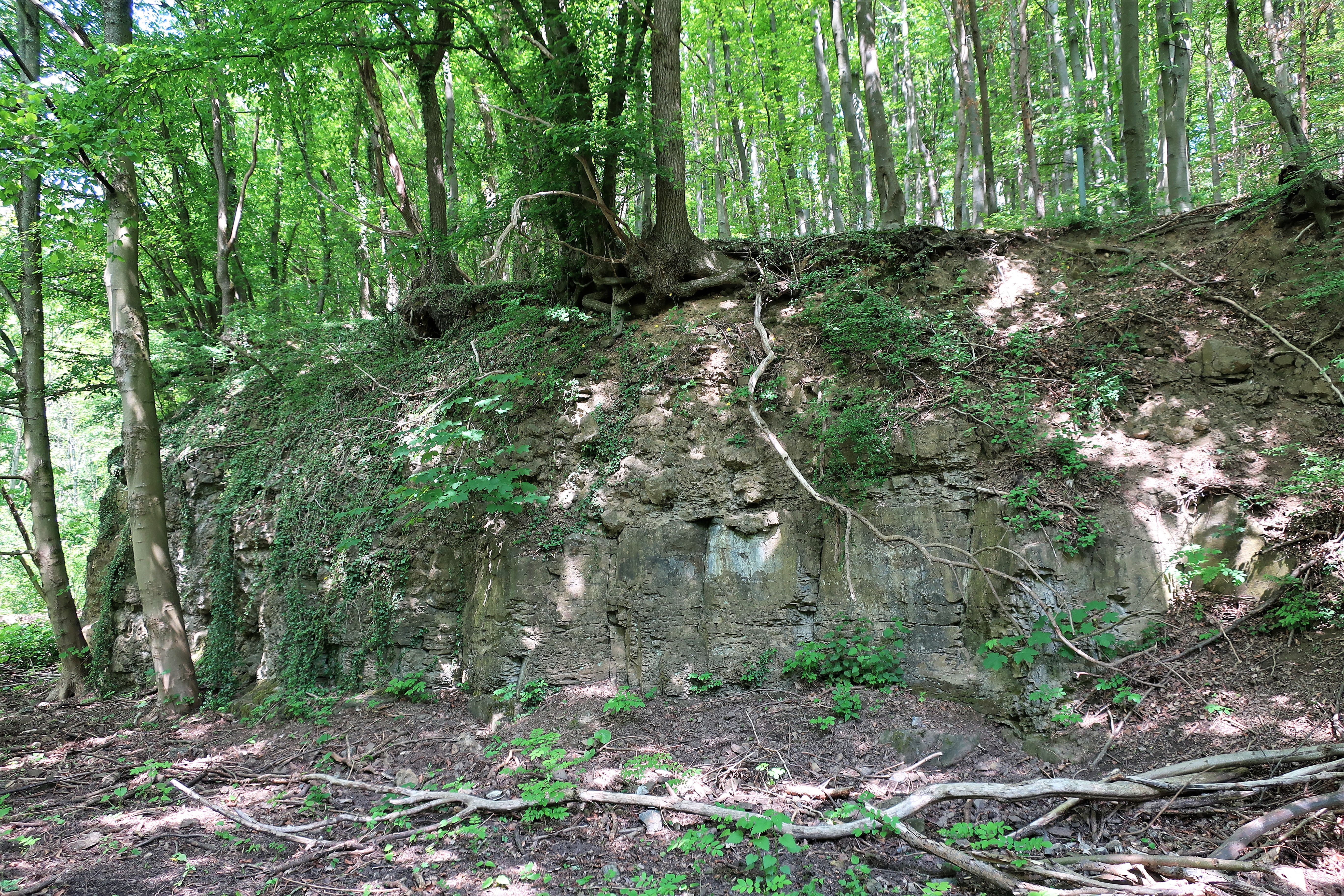 Naturschutzgebiet Hardt (NSG HA 016) in Hagen. Volmehang Emst - Delstern. Etwa 250 m südlich des Straßenabzweiges "Im Eichenwald" an der Straße "Am Berghang" in Emst kommen bis zu 20 m mächtige geschichtete Korallen-Stromatoporen(1)-Brachiopoden(2)-Kalksteine vor, die als Vorläufer des Massenkalkes anzusehen sind. Die ersten Riffansätze wurden immer wieder von tonigen Sedimenten zugedeckt, bis diese aufgrund der paläogeographischen Verhältnisse letztendlich komplett von tonigen Sedimenten überlagert wurden (1 Stromatoporen werden heute meist den Schwämmen zugeordnet; 2 Brachiopoden: Armfüßer, ähneln Muscheln, sind aber nicht miteinander verwandt).